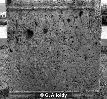 F001706